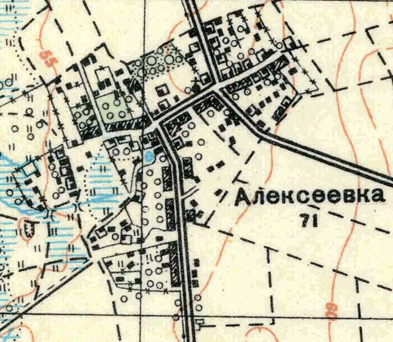 Топографическая карта Ленинградской области, квадрат О-35-22-Г-а (Керстово), деревня Алексеевка.